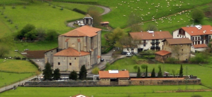 Berastegi, Guipúzcoa.